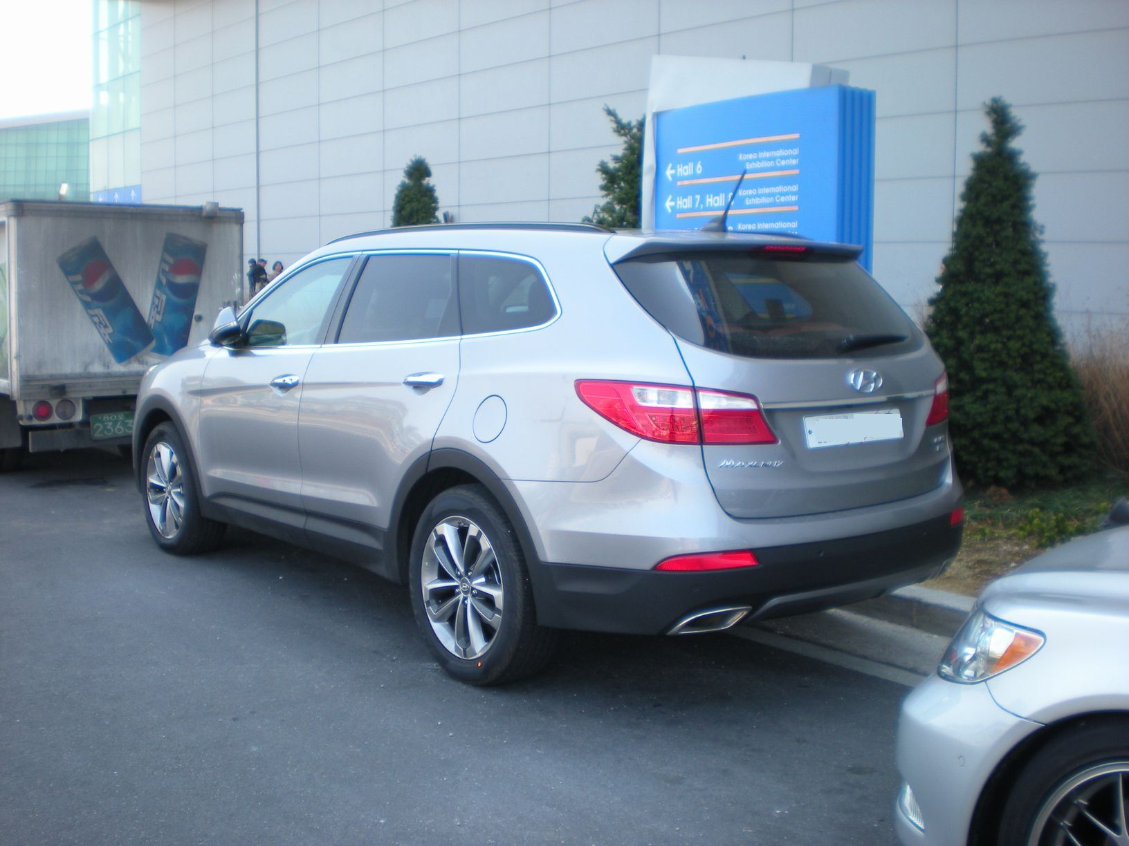 ヒュンダイ・マックスクルーズ